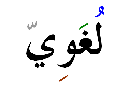 Դամմա,Ֆաթհա,Քասրա